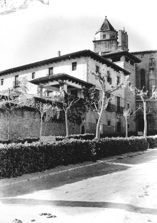 Edifici amb pati. Reformes de Masó